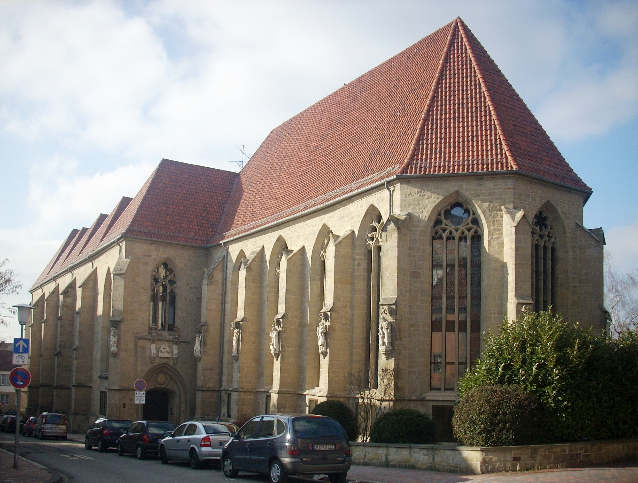 Hildesheim, ehem. Dominikanerkirche St. Paulus